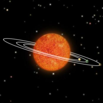 Kreisförmiger Ausschnitt aus einer flächigen Darstellung eines unregelmäßigen Musters ähnlich dem Erscheinungsbild der Sonnenoberfläche im Wellenlängenbereich der H-alpha-Spektrallinie, dabei Helligkeitsverlauf in Farbverlauf rotorange–gelb transformiert, mit schmalem Transparenzverlauf am Rand vor einer schwarzen Fläche dargestellt, auf der einige helle Punkte ähnlich dem Erscheinungsbild des Sternenhimmels verteilt sind. Umgeben von einer symbolischer Darstellung dreier koplanarer Planetenbahnen als durchgezogene Ellipsen, auf denen rechts außen je eine einen Planeten symbolisierende Kugel so dargestellt ist, als ob sie von schräglinks vorne in je einer unterschiedlichen Intensivfarbe (gelb, grün bzw. braun) angestrahlt wäre. Von der NASA veröffentlicht als Illustration anlässlich der Entdeckung des Objektes planetarer Masse Cha 110913-773444, das nach aktuellem Kenntnisstand tatsächlich von einer Staubscheibe umgeben ist.